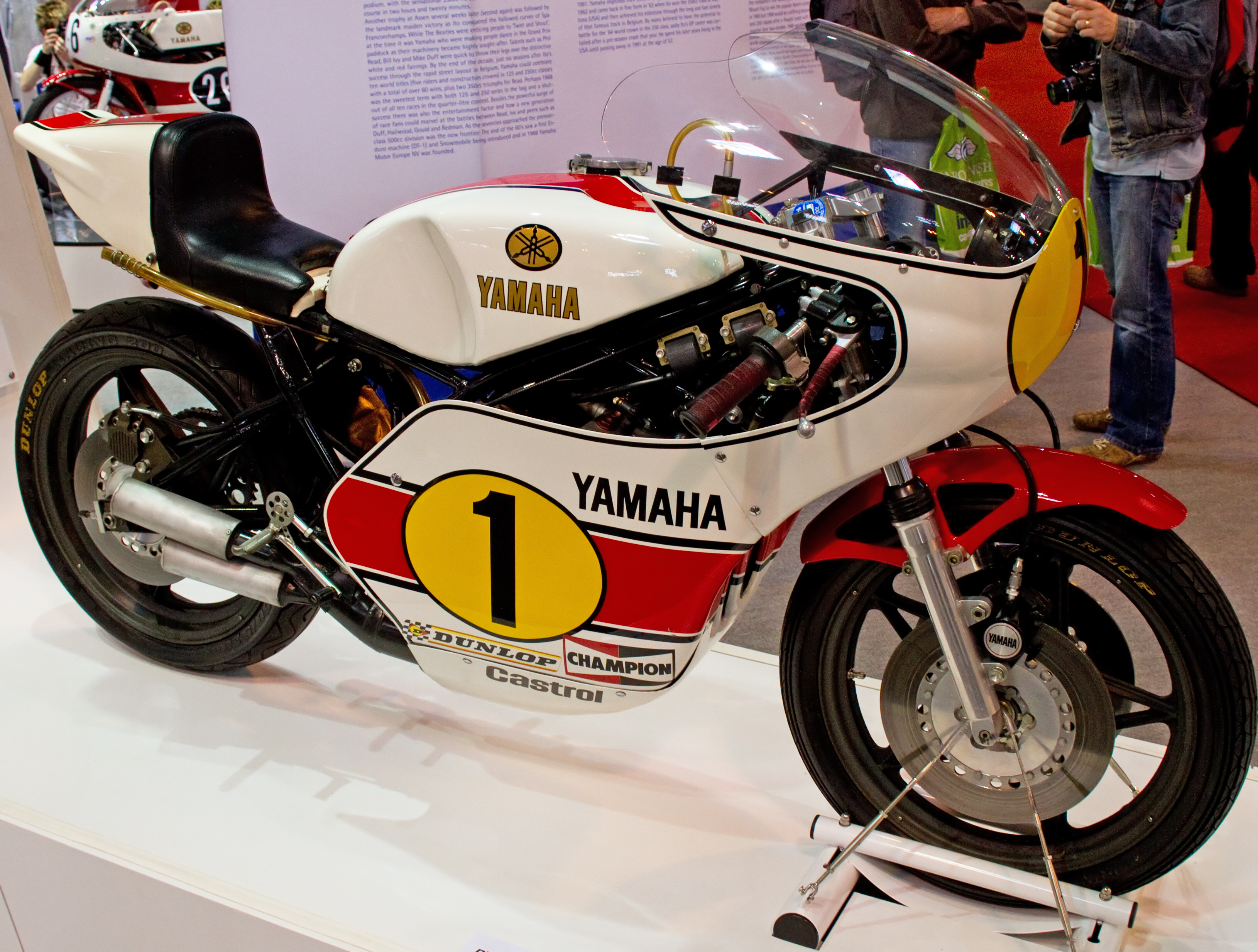 1975 Yamaha OW23 YZR500